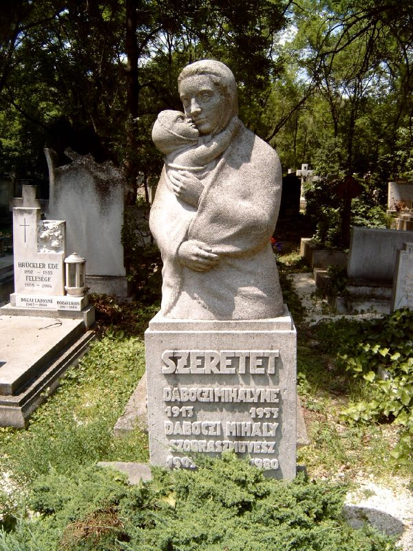 Dabóczi Mihály sírja Budapesten. Farkasréti temető: 28/2-7-16. A szobrász saját alkotása.Viktoria Palatinusz & Mihály Dabóczi's Tomb.